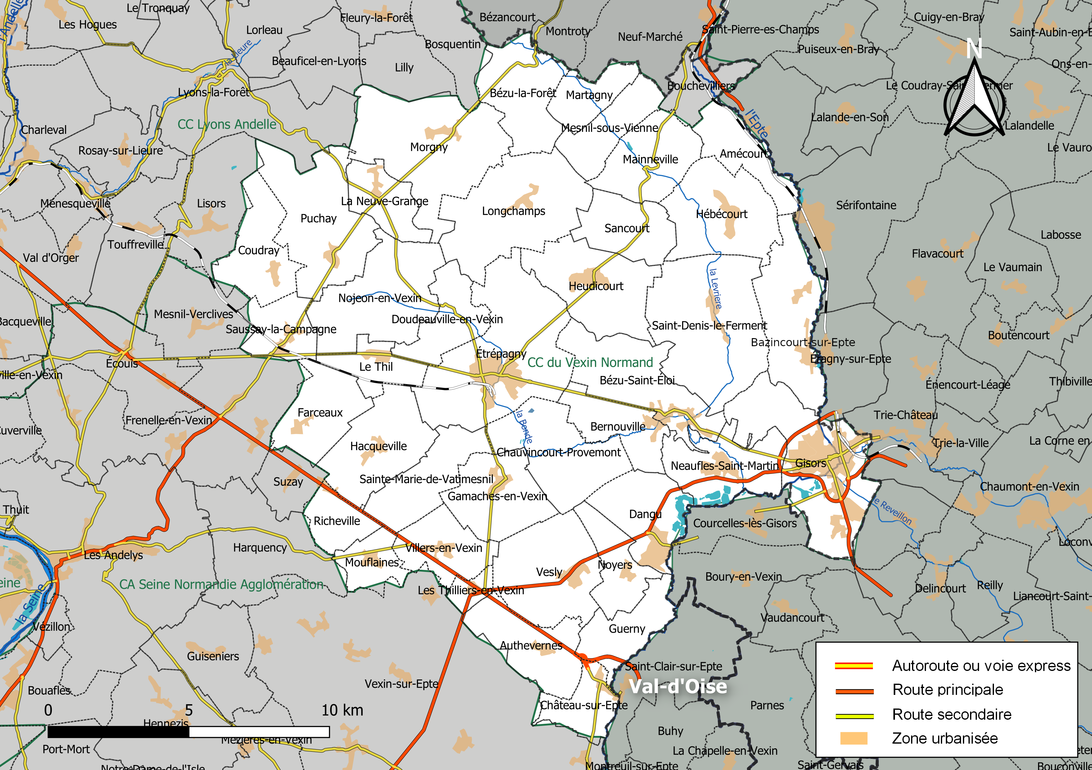 Carte géographique de la Communauté de communes du Vexin Normand, département de l'Eure, France. Composition au 1er janvier 2019.